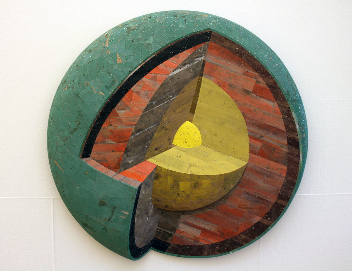 Basreliëf door Ron van der Ende